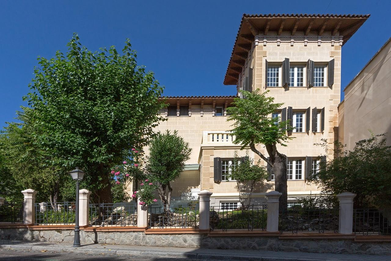 Padre Rubio Hall